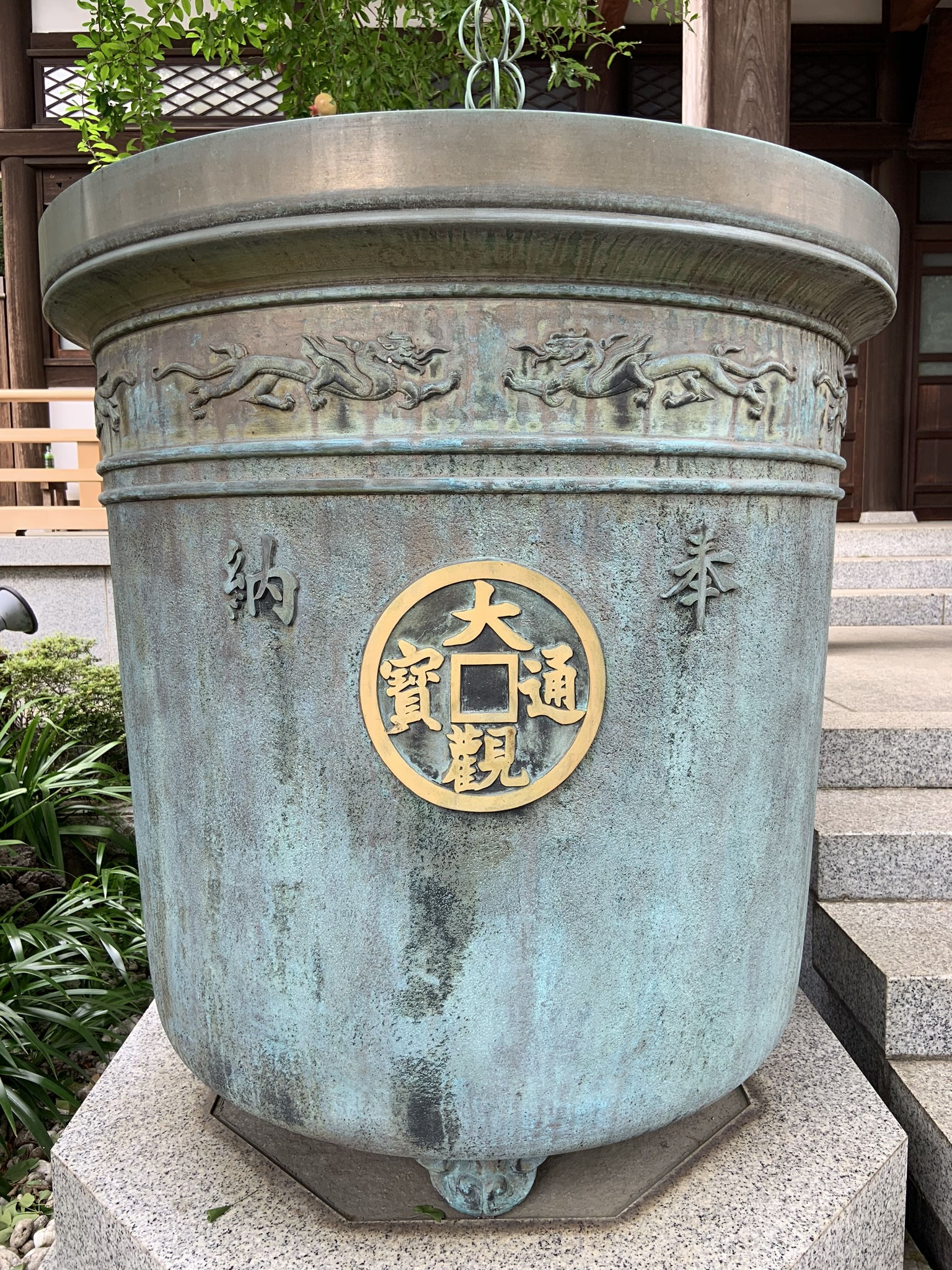 成願寺(東京都中野区)の天水桶。寺の縁起にちなんで、宋銭の「大観通宝」のデザインがあしらわれている。2019/09/12撮影